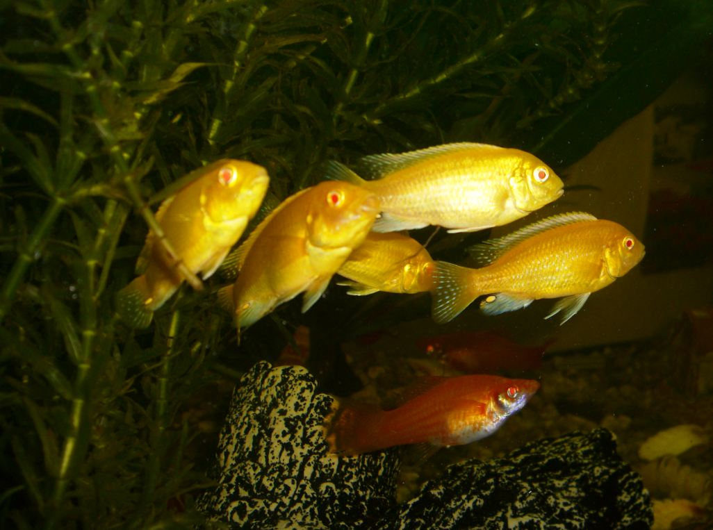 Albino Yellow Buntbarsch, in Schweinfurt gekauft (Germany)